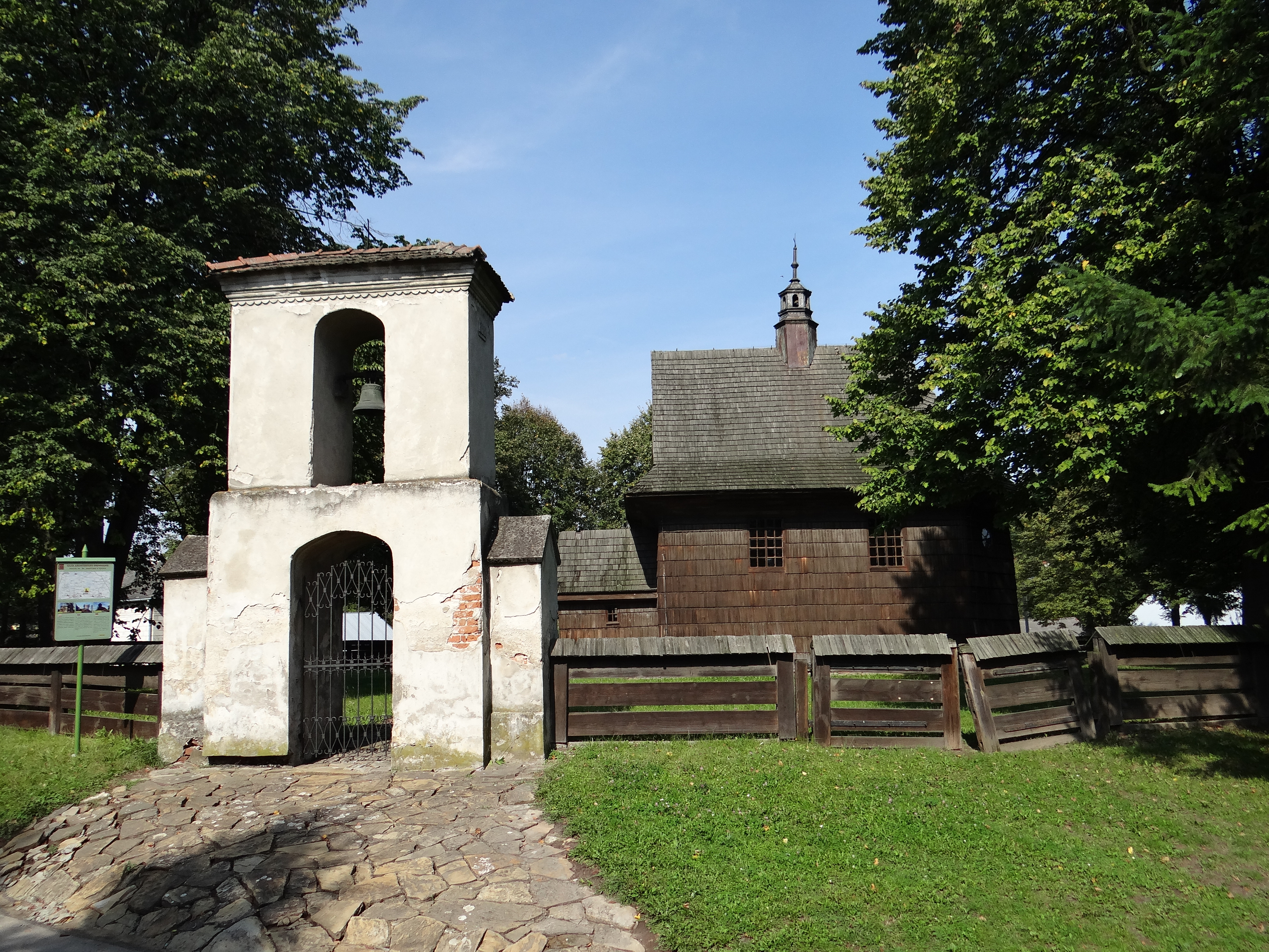 Kosina, zespół kościelny